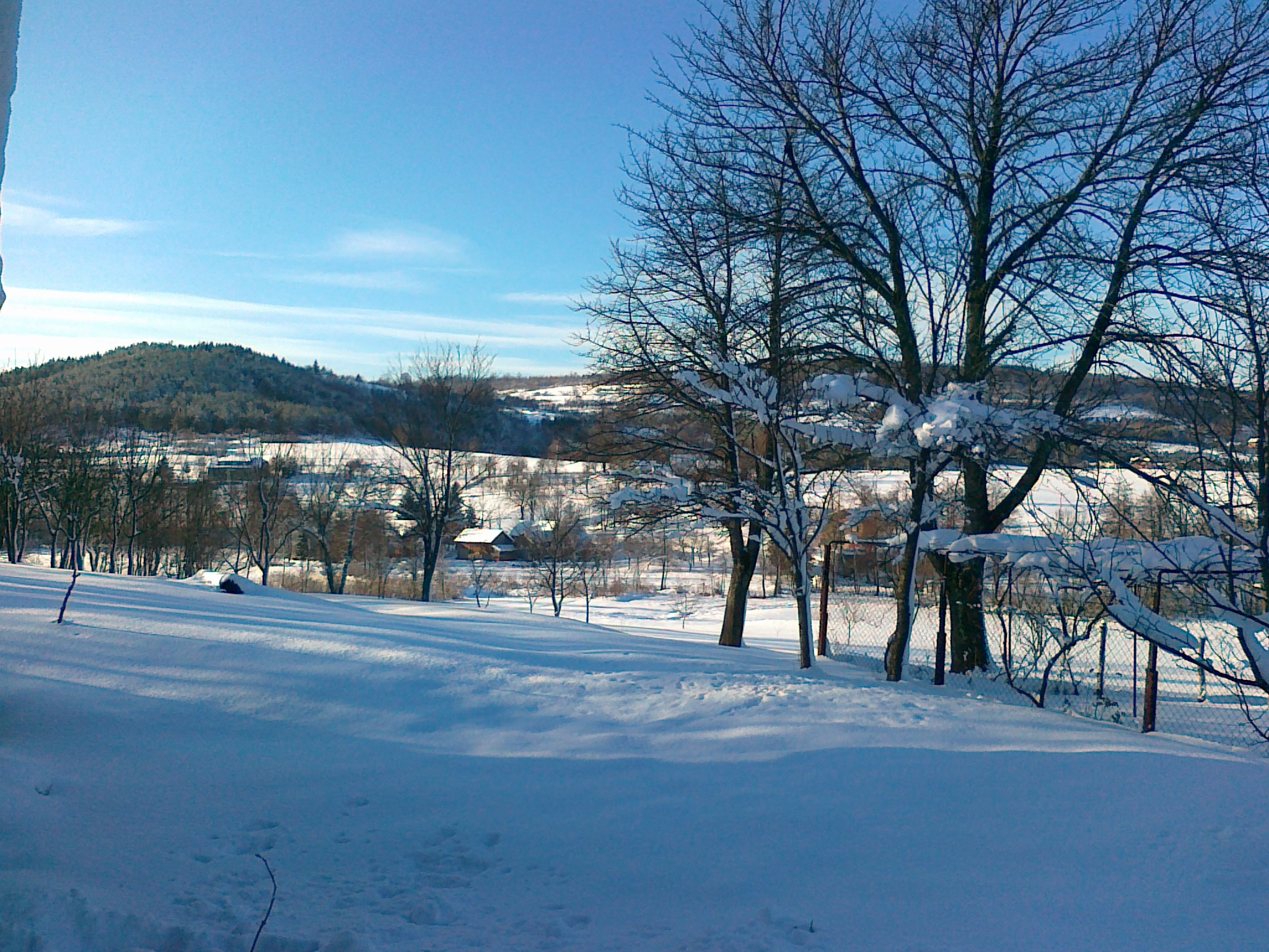 Zima u Modruškoj Munjavi